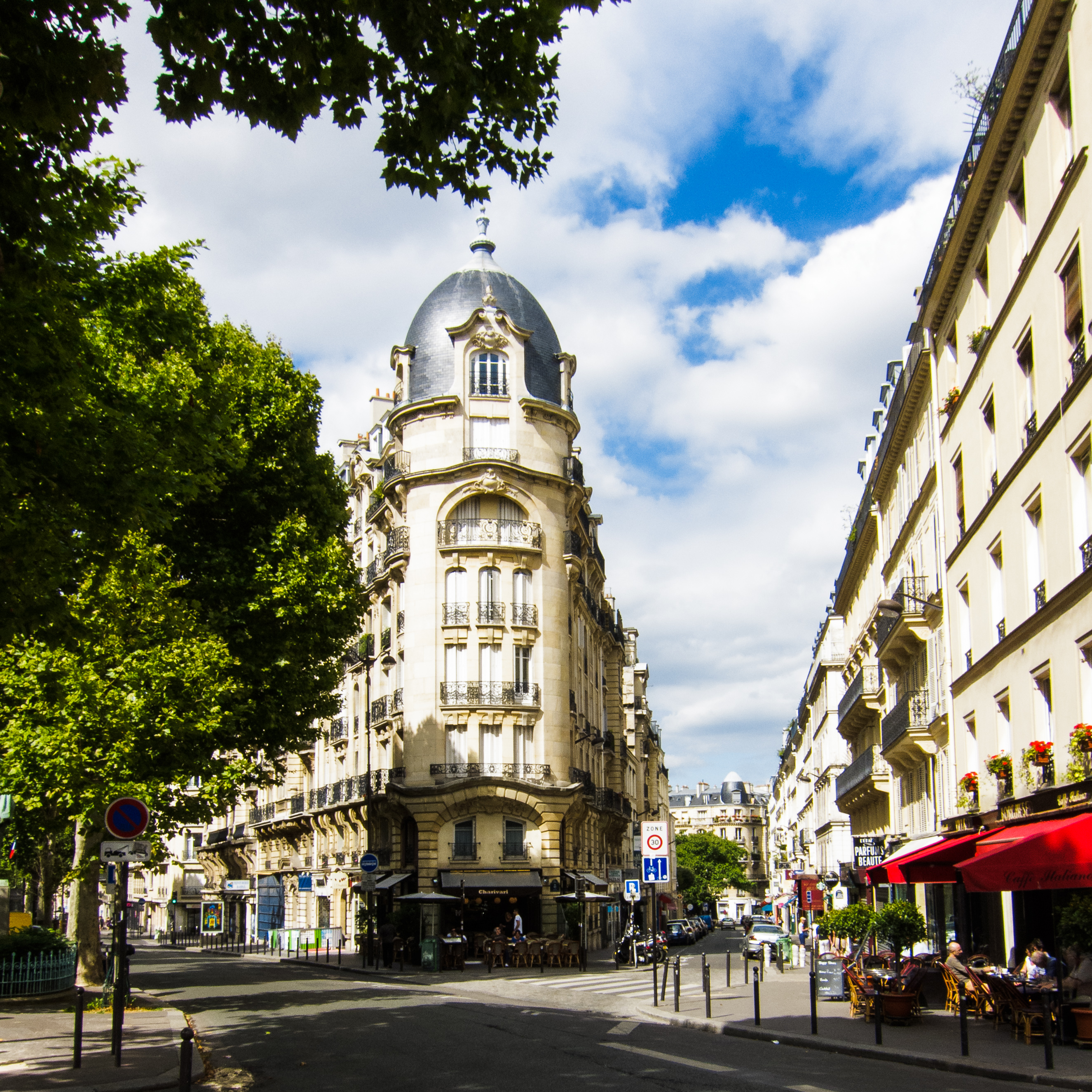 Boulevard Raspail and Rue Bréa, Paris.